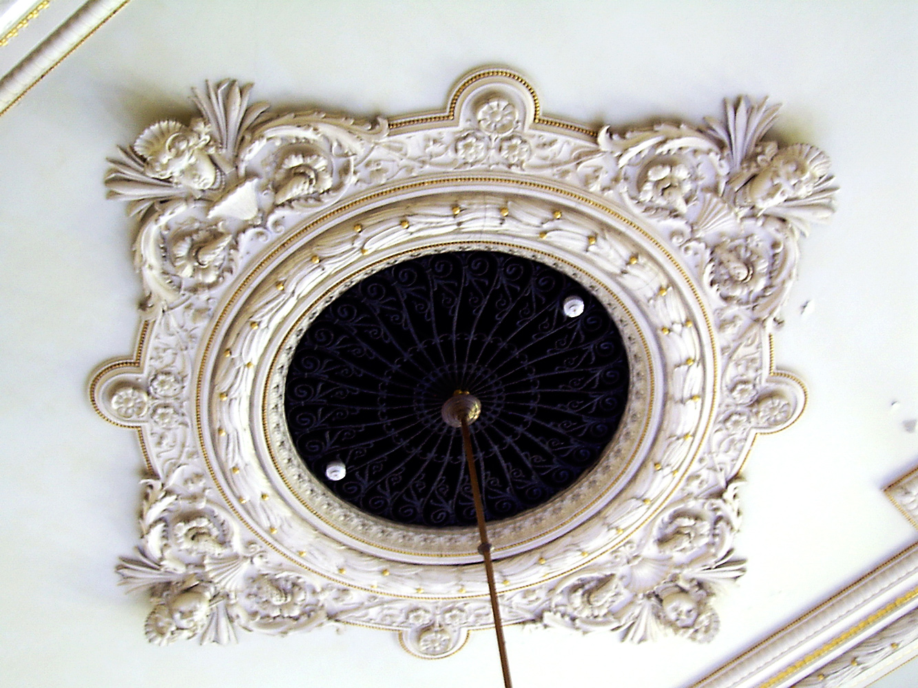 Takrosett Luleå Stadshotell, fotograferad sommaren 2011.